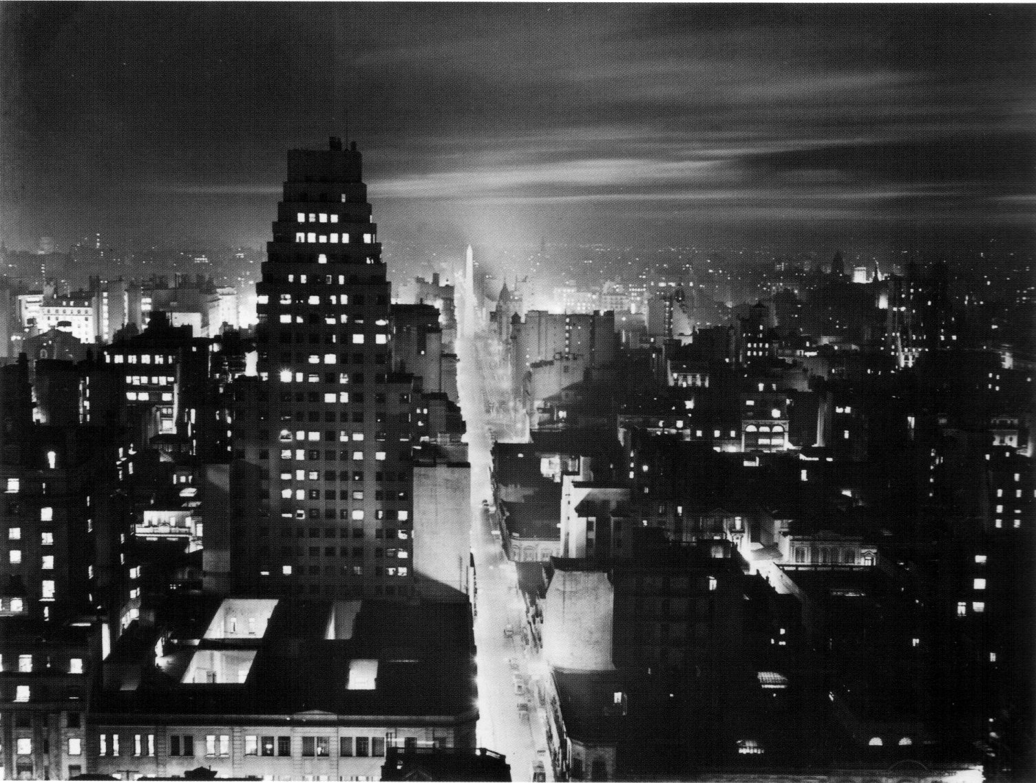 Vista nocturna de la Avenida Corrientes hacia el oeste y edificio SAFICO desde el edificio COMEGA, Buenos Aires, en 1936.